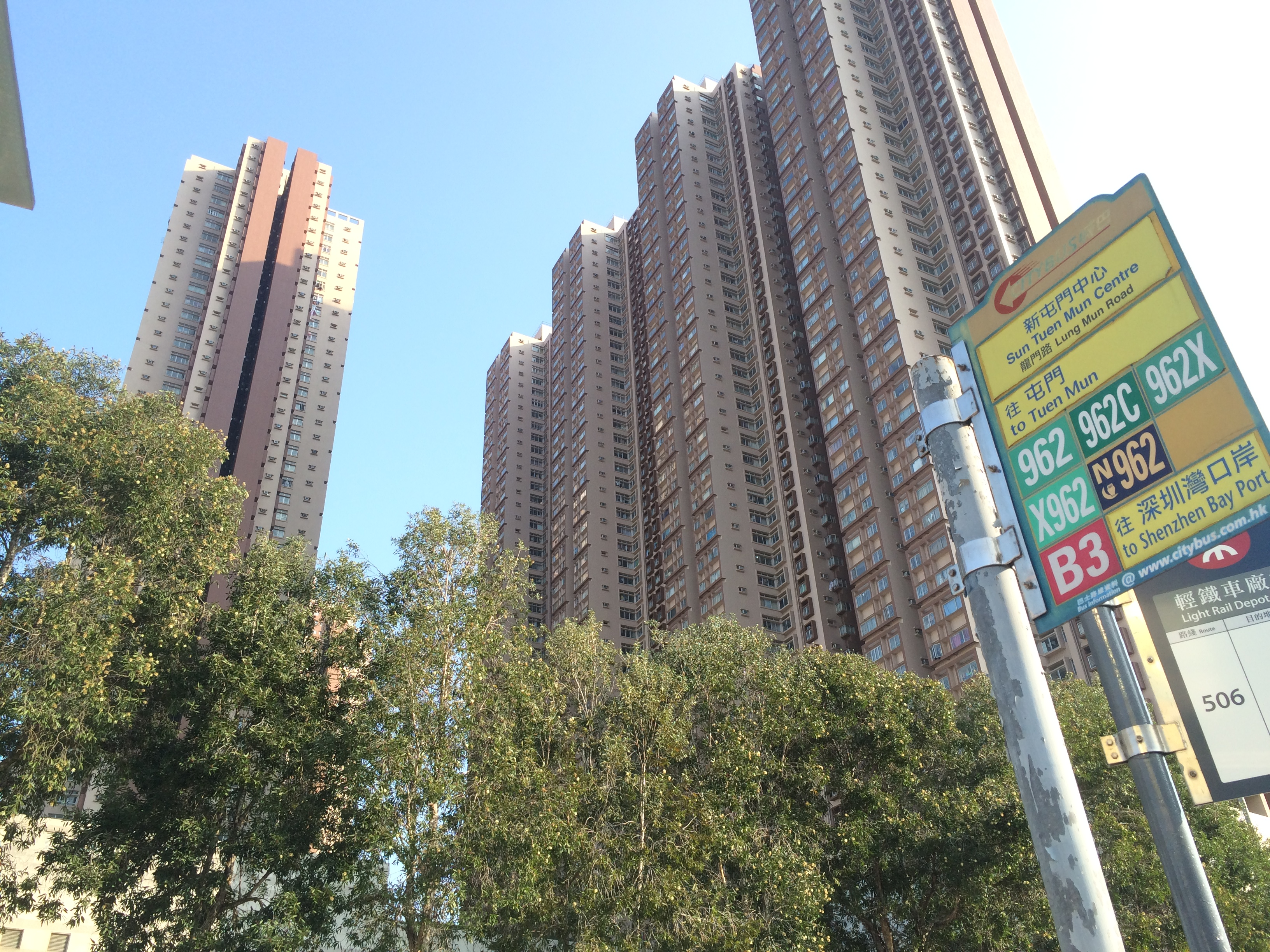 新屯門中心鄰近車站 - 巴士站